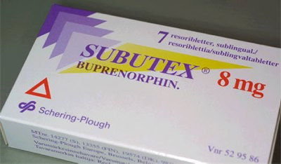 Subutex 8 mg -pakkaus.